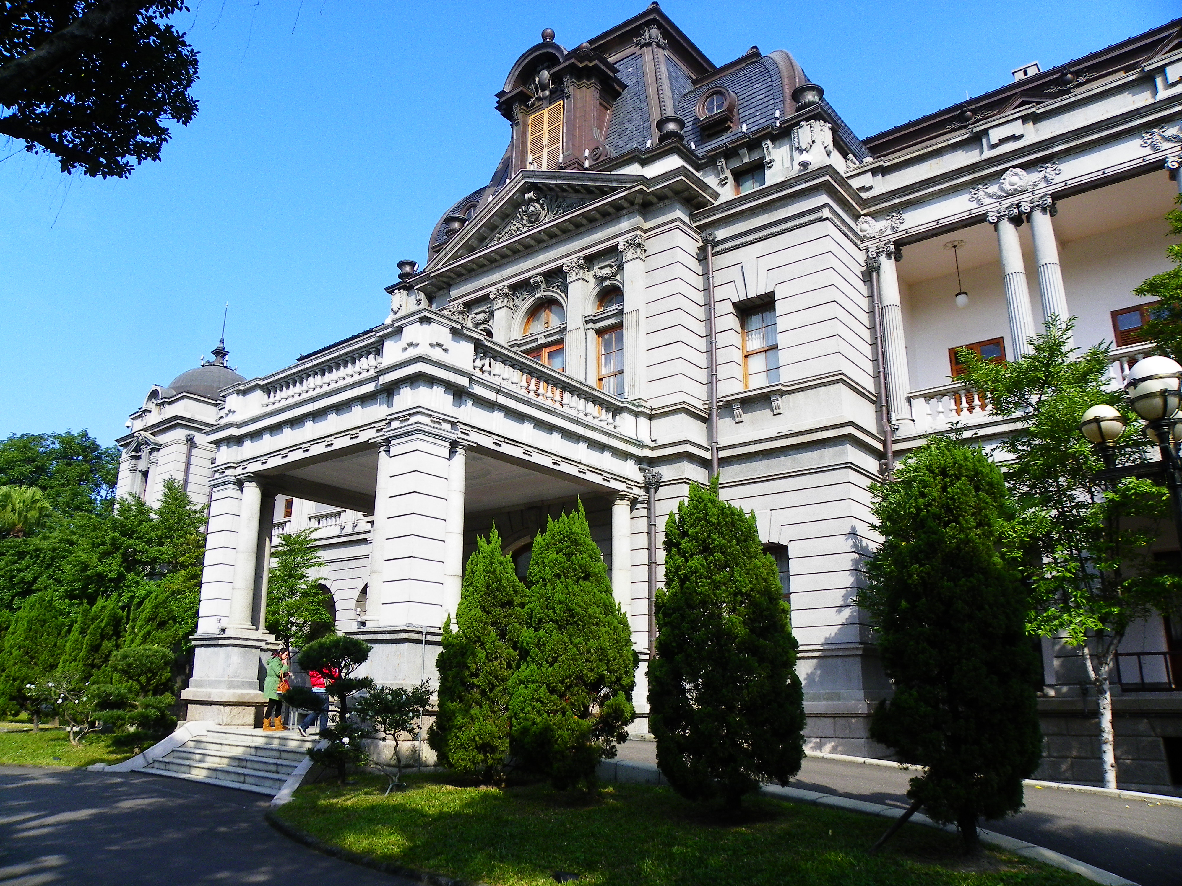 台北賓館洋館入口の東南隅。